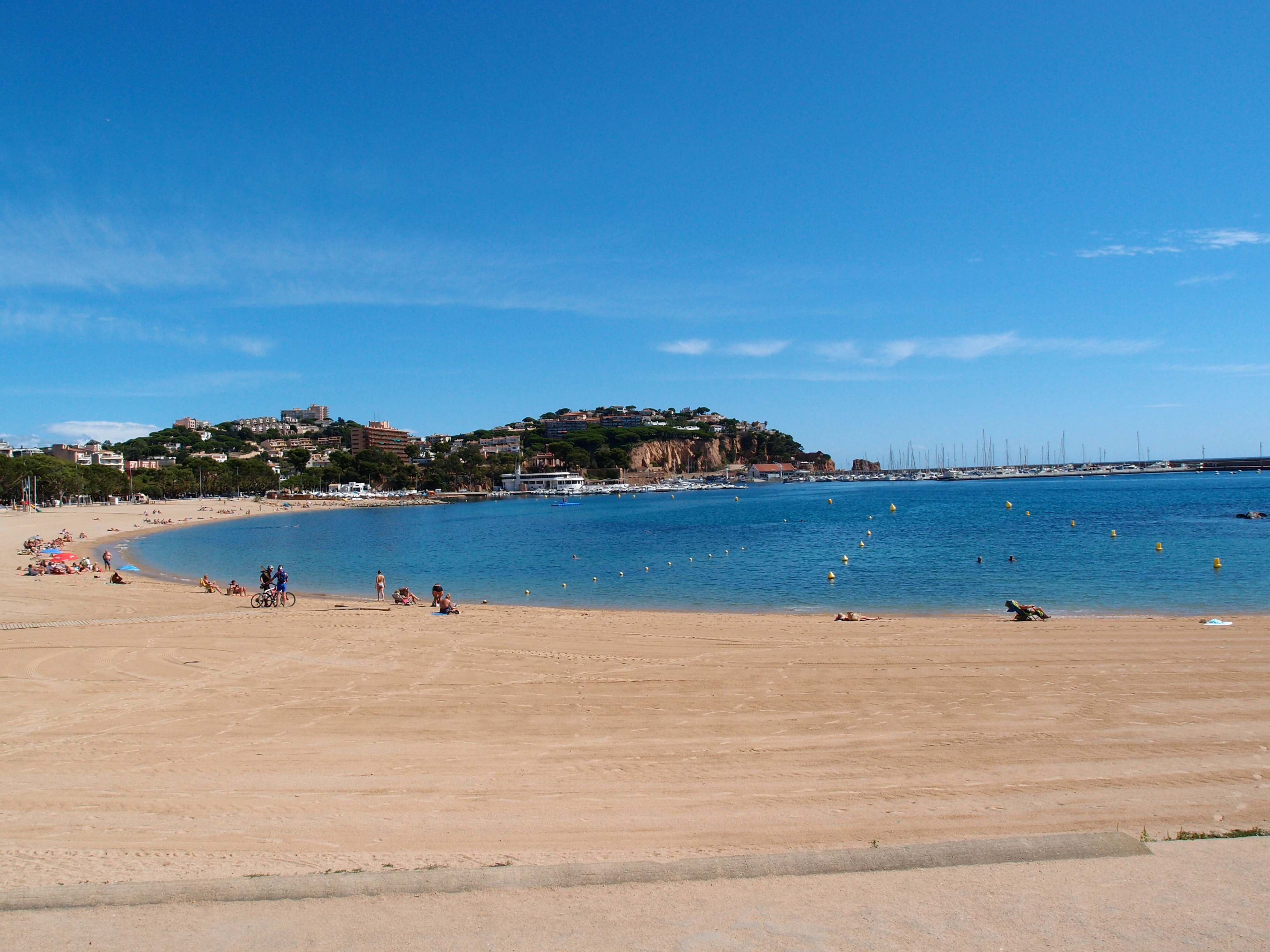 Sant Feliu de Guíxols - Stadtstrand Datum: 19.09.2011 Urheber: M. Pfeiffer alias Benutzer:Gordito1869 Quelle: privates Fotoarchiv des Urhebers